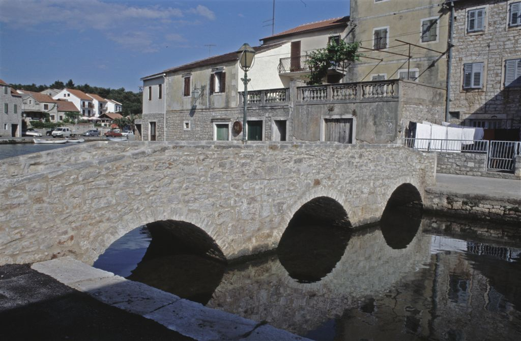 Ein netter beschaulicher Ort auf der Insel Hvar. Alte Gemäuer, Uferpromenaden, nette Gastronomie laden zum Verweilen ein.